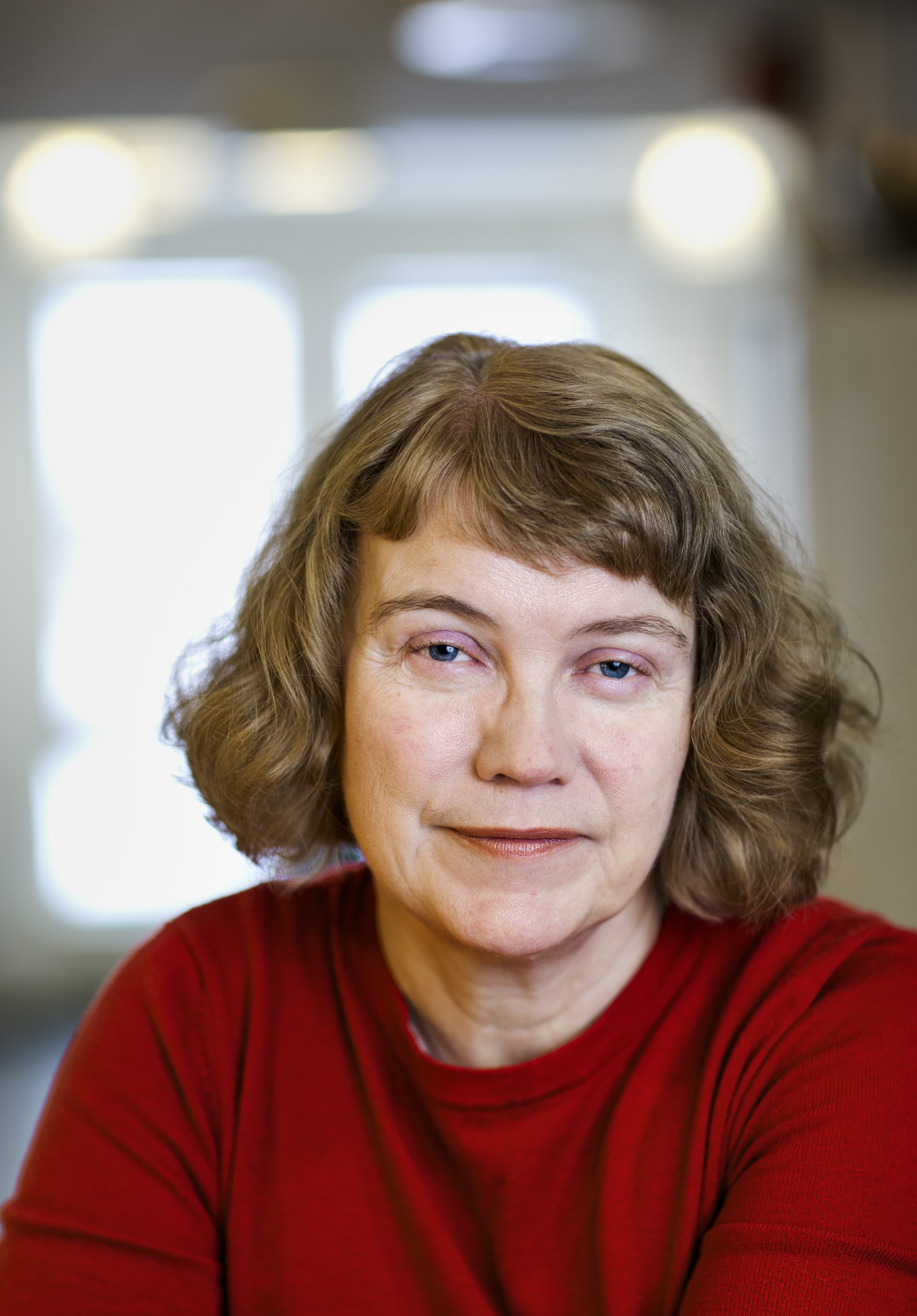 Marie Demker 2015